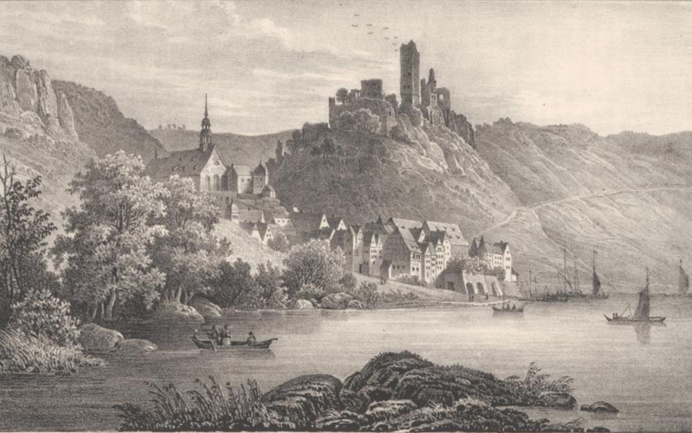 Beilstein, Lithographie : 12 x 15 cm, Heinrich Wilhelm Teichgräber